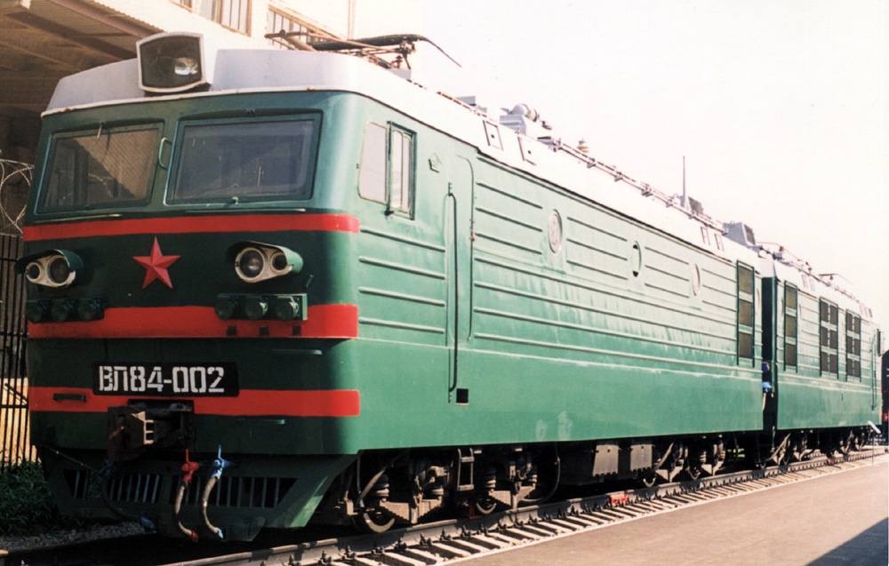 Электровоз ВЛ84-002 в музее Ростов-на-Дону